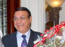 Paintal at Roshan Taneja's Birthday Bash